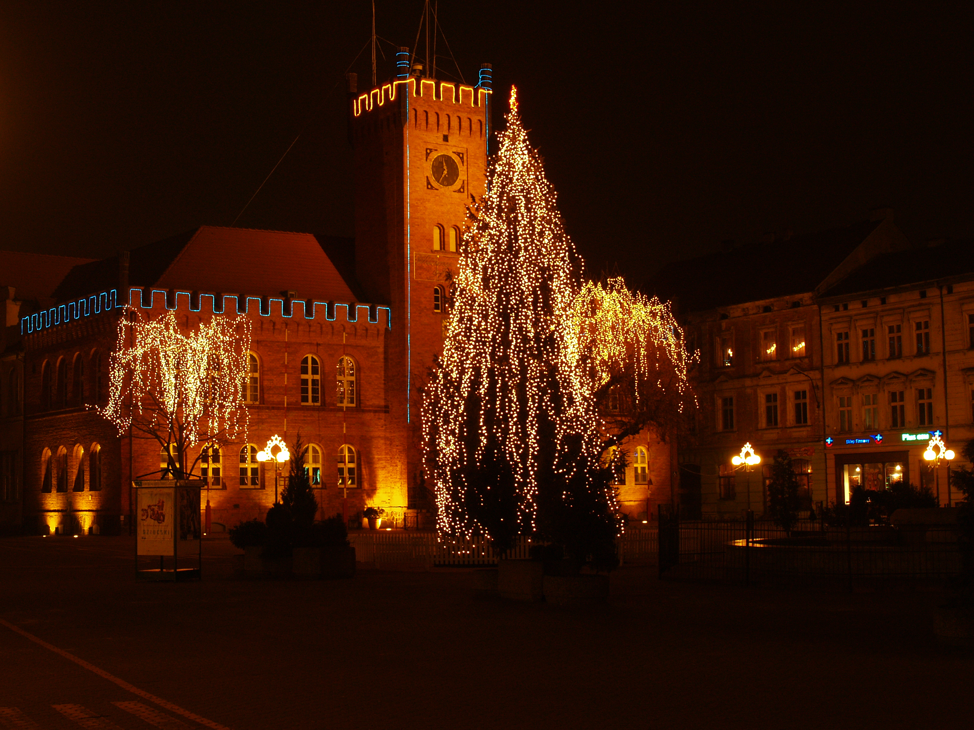 Szczecinek siedziba Urzędu Miasta nocą wystrój świąteczny (Boże Narodzenie)